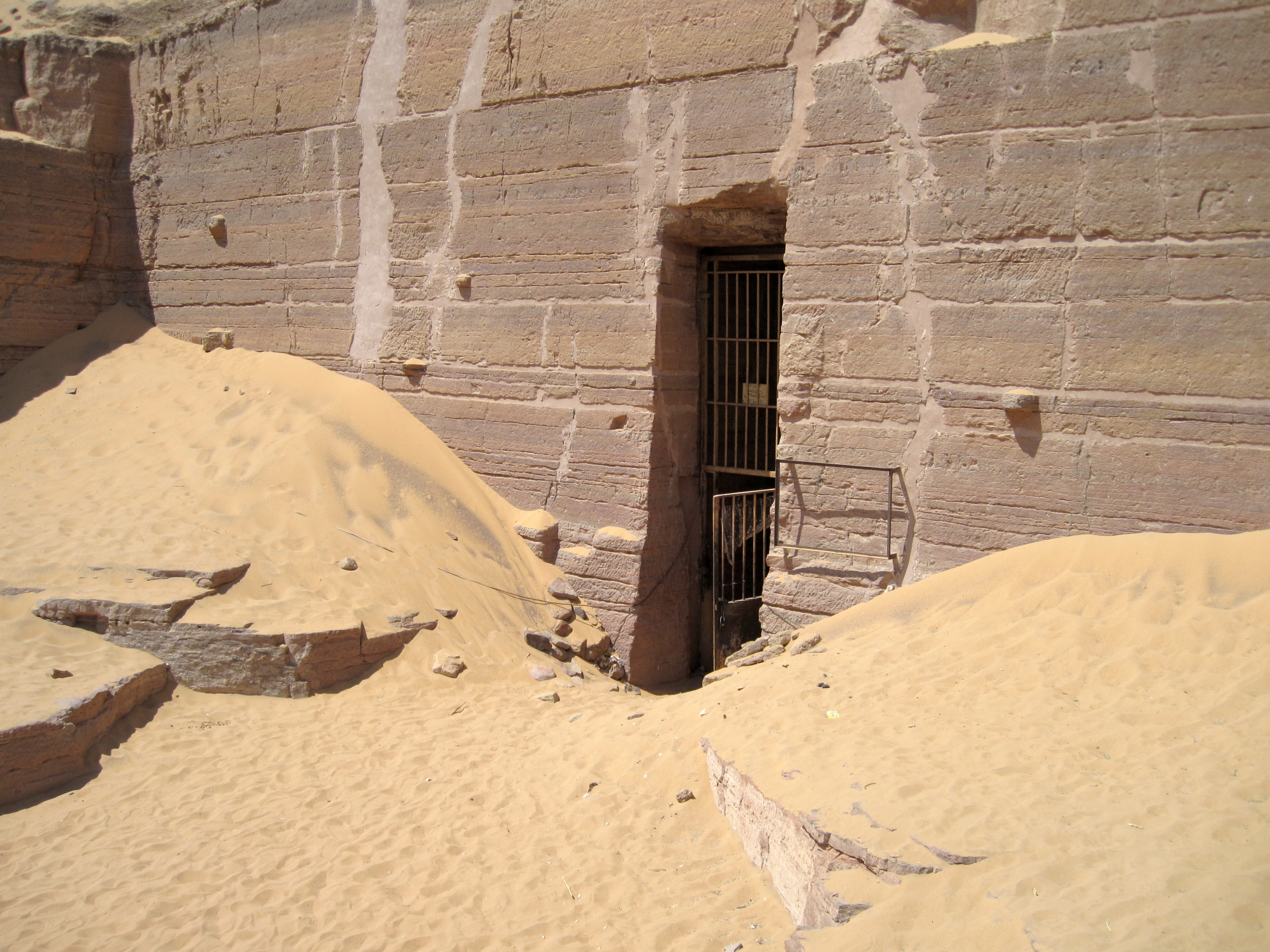 Eingang zum Felsengrab des Sarenput II. auf dem Qubbet el-Hawa bei Assuan, Ägypten